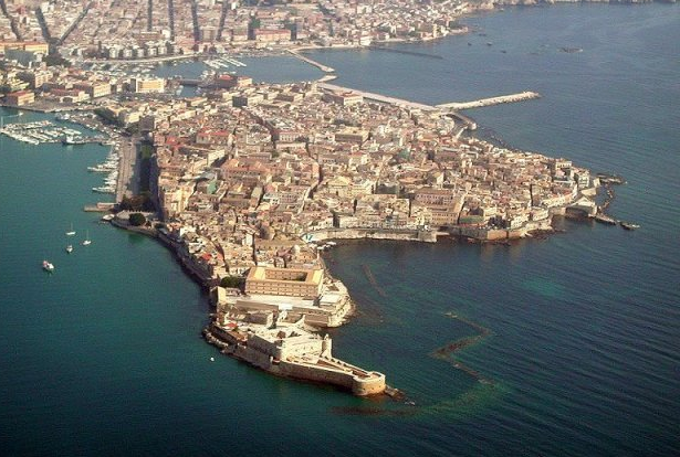 Isola di Ortigia, Siracusa